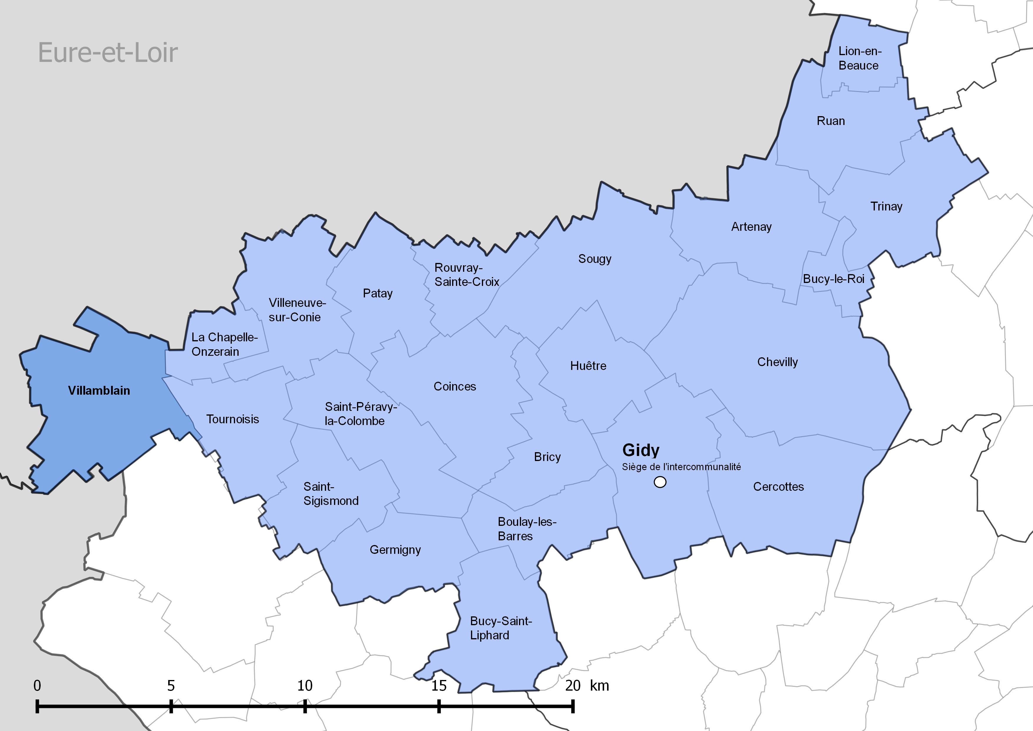 Périmètre de la communauté de communes de la Beauce loirétaine - Situation de la commune de Villamblain